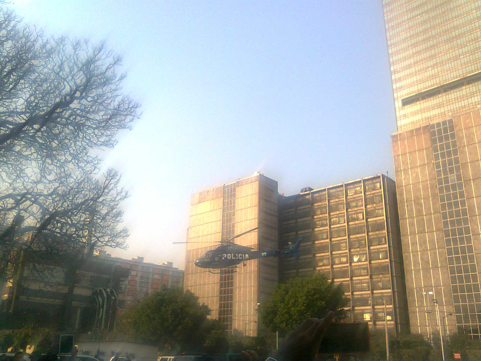 DESPEGUE DE HELICOPTERO DURANTE LA EXPLOSION EN LA TORRE DE PEMEX